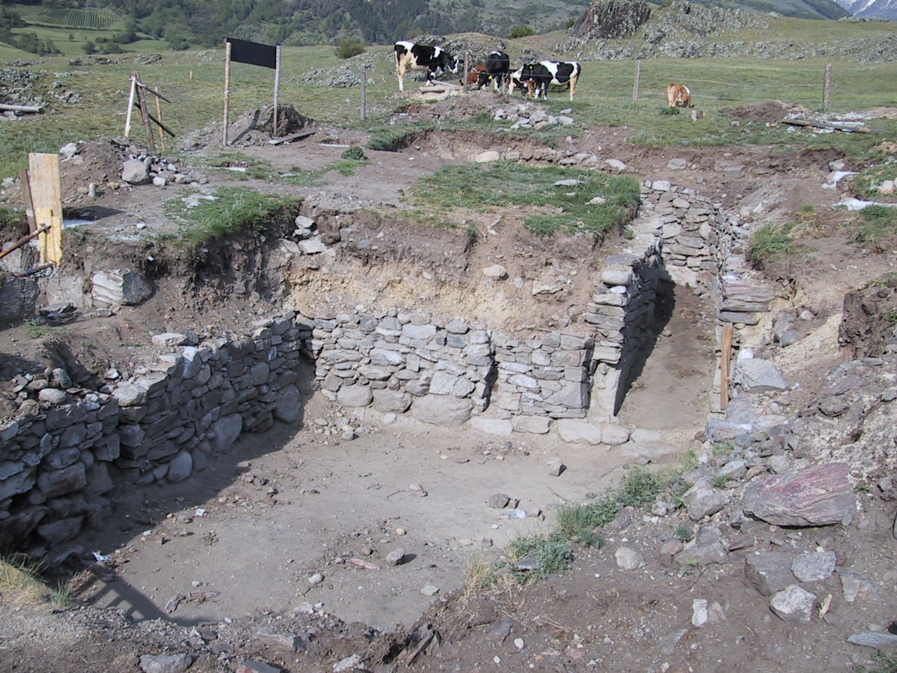 Reste eines rätischen Hauses in den Stocker Gruben aufgenommen während der Ausgrabungskampagne 2000